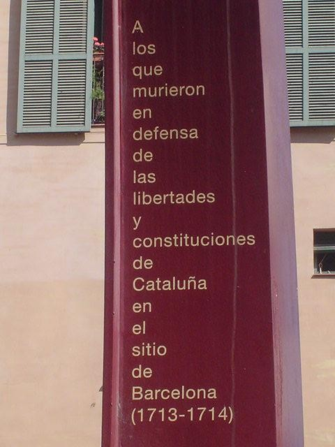 Monumento a los caídos en barcelona 1713-1714